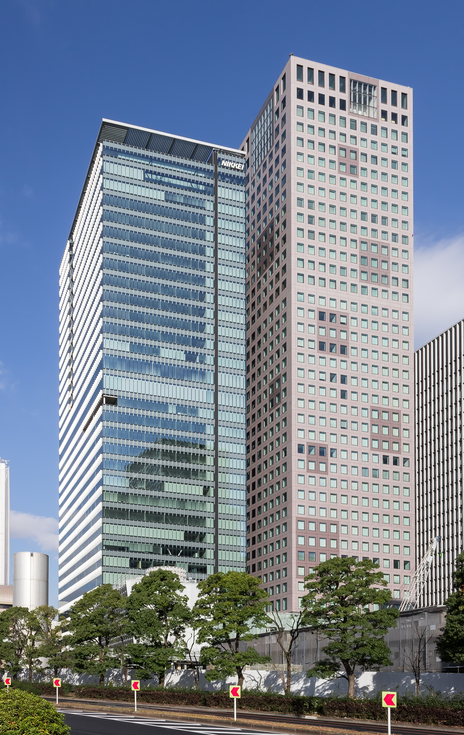 日経ビル（日本経済ビル本社）、大手町JAビル（全国農業協同組合中央会本部、全国農業協同組合連合会本部）。